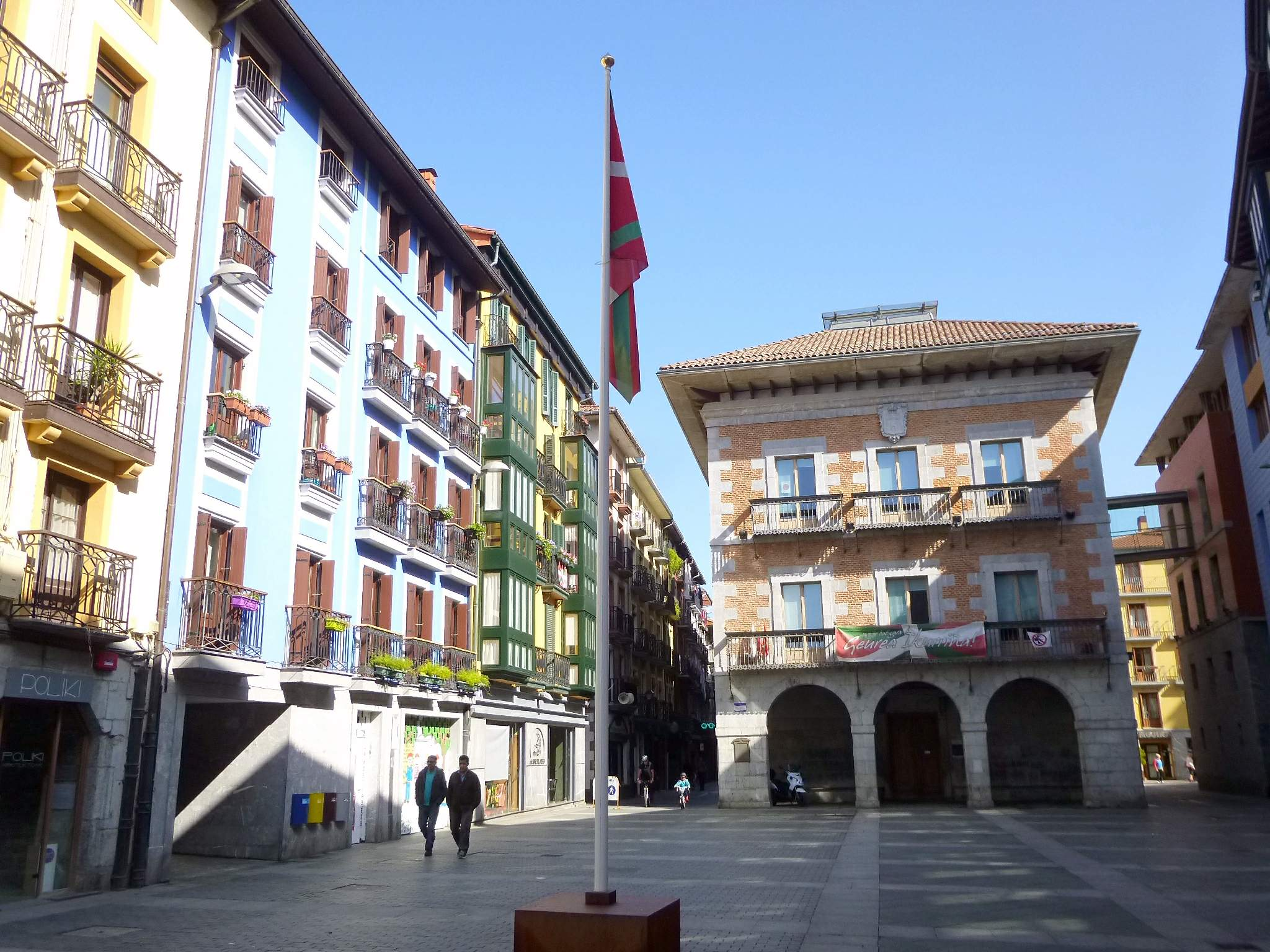 Andre Maria Plaza (Tolosa)